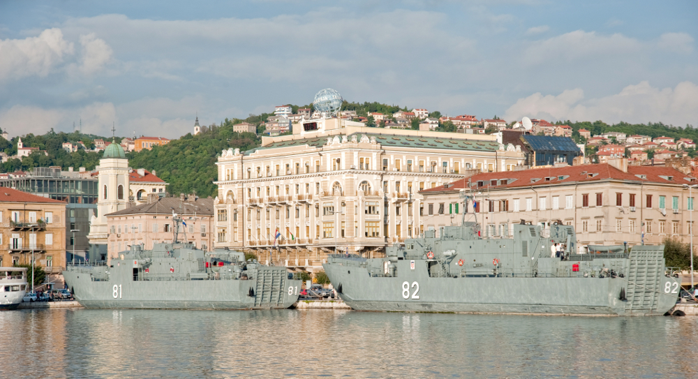 Dan HRM-a, Rijeka